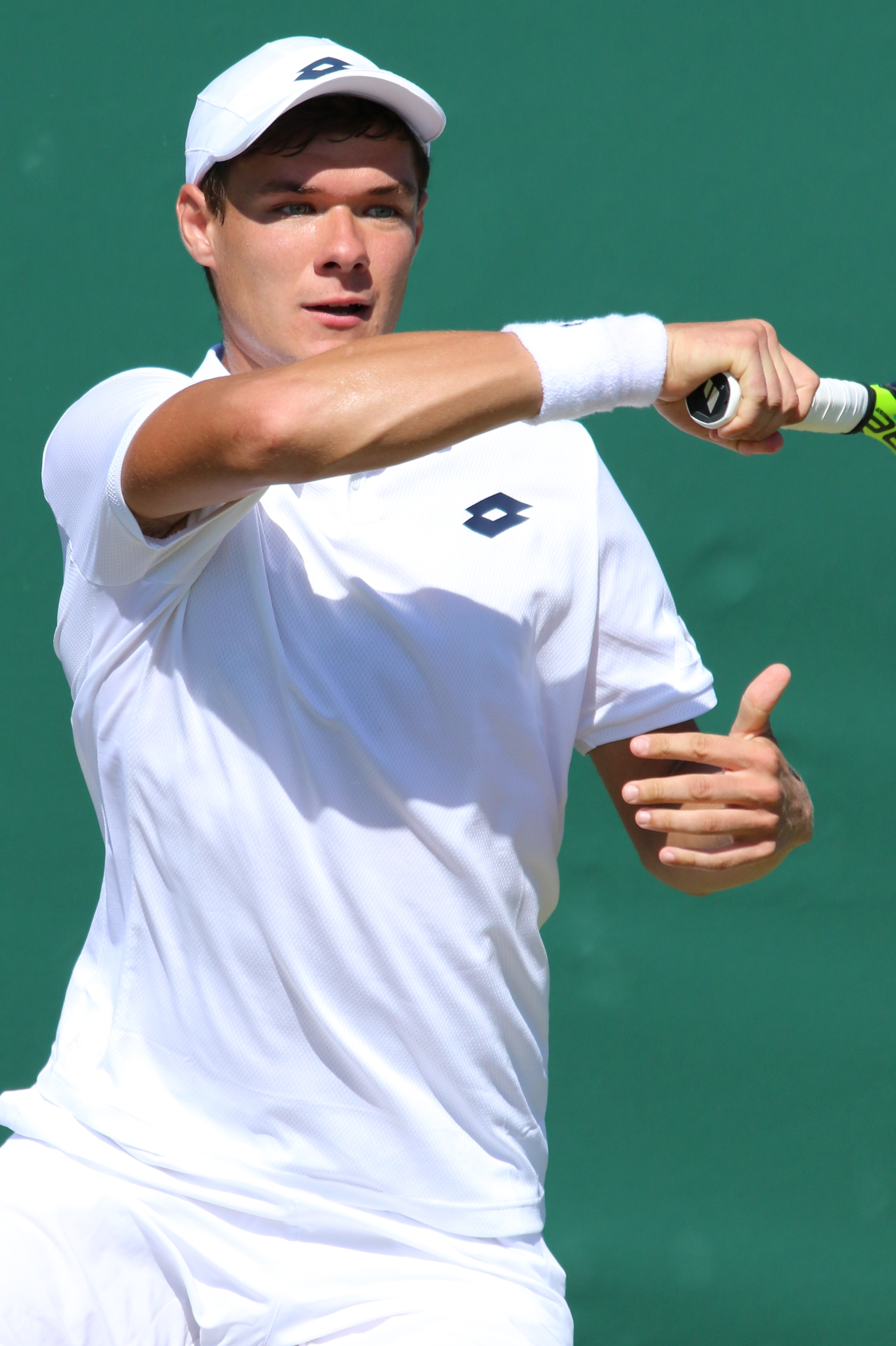 Majchrzak WMQ18 (27)